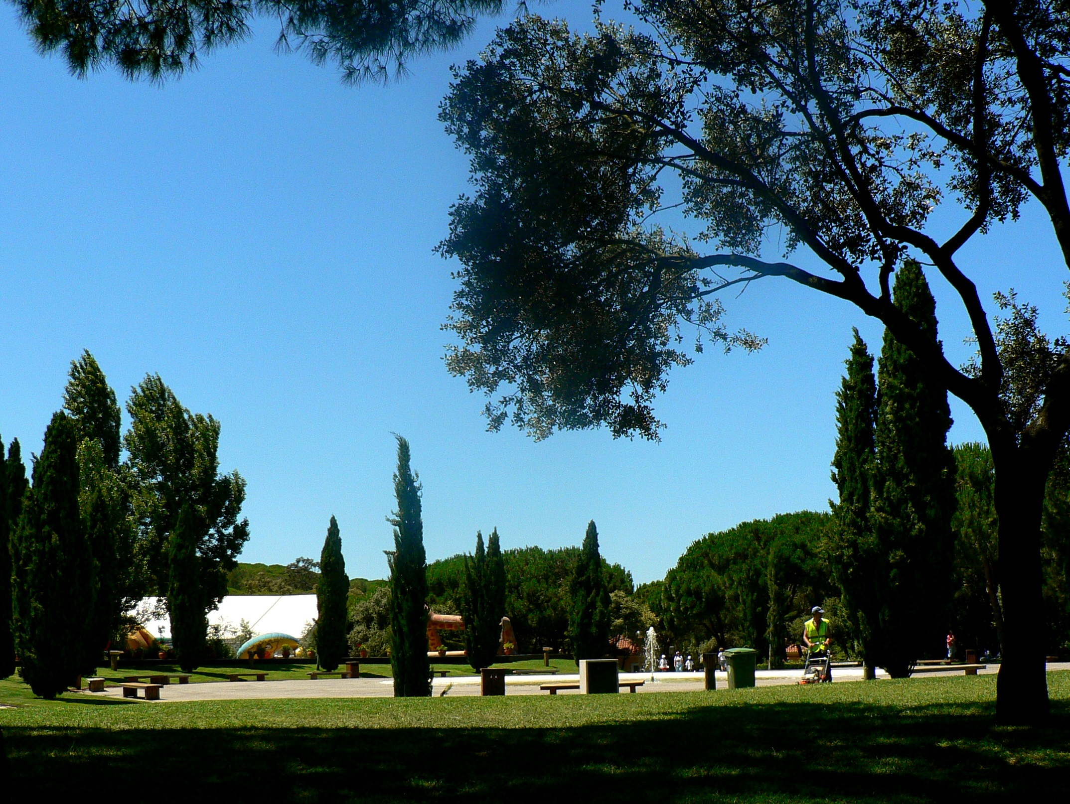 VistaParque Urbano do Alto da Serafina